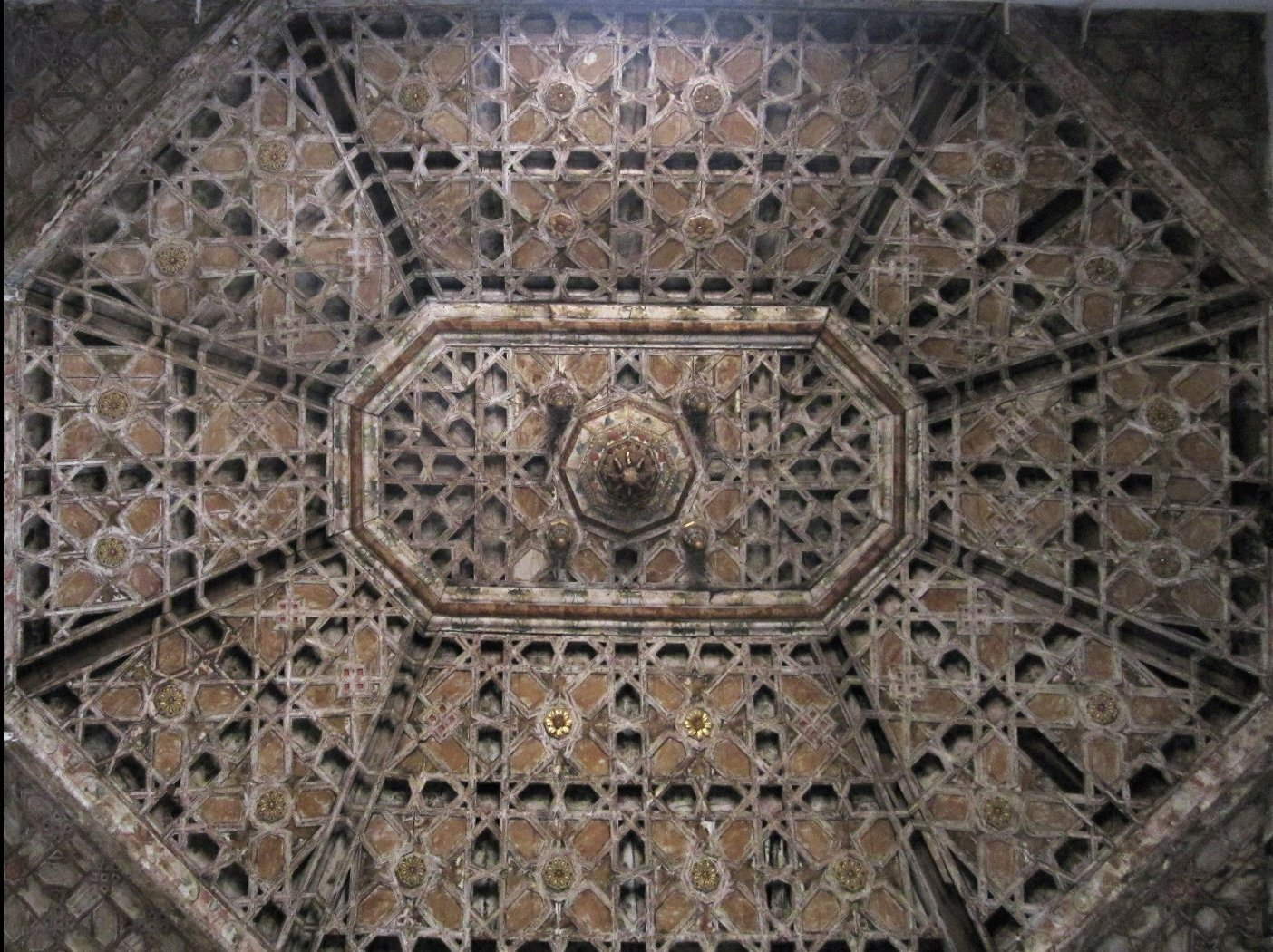 Teneriffa, La Laguna, Nuestra Senora de la Concepcion, Artesonadodecke - 5. 11. , Innenraum, Foto 2012